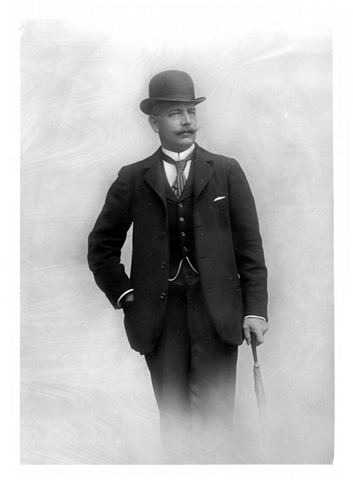 Wilhelm von Eckermann 1899